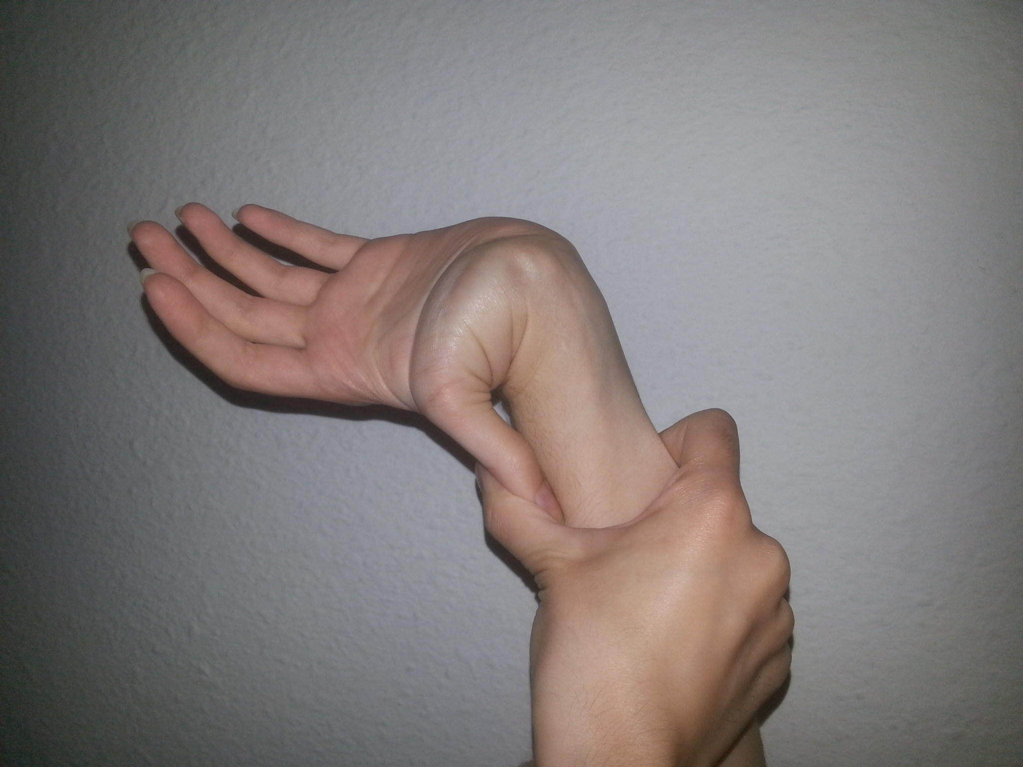 Hypertension, Daumen berührt den Oberarm von hinten.